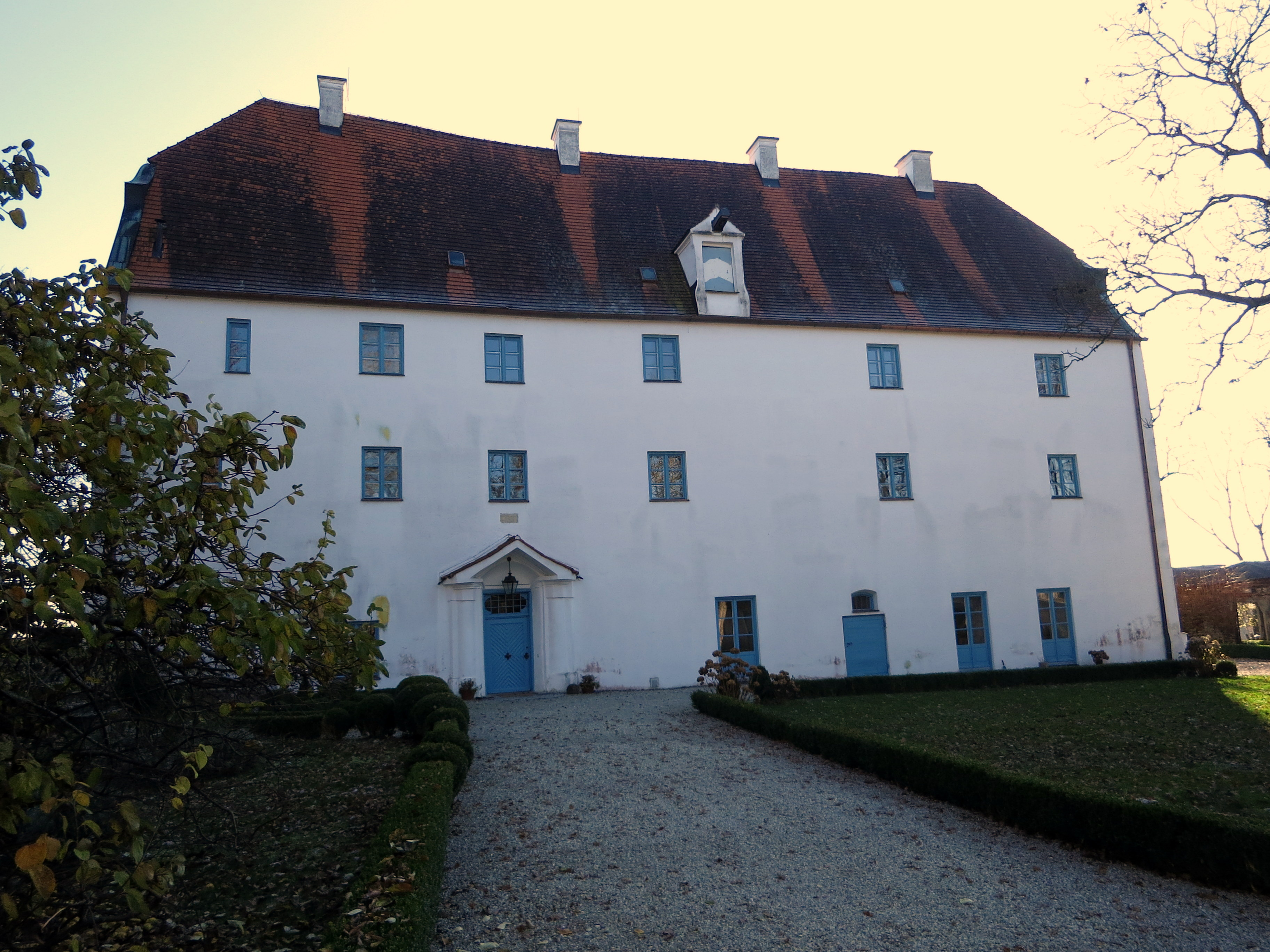 Liegt in der Nähe der Kirche des gleichnamigen Orts.